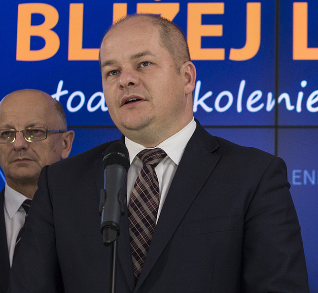 Konferencja BLIŻEJ LUDZI: młode pokolenie i seniorzy, (Warszawa, 29.10.2014), fot. Ewelina Lach